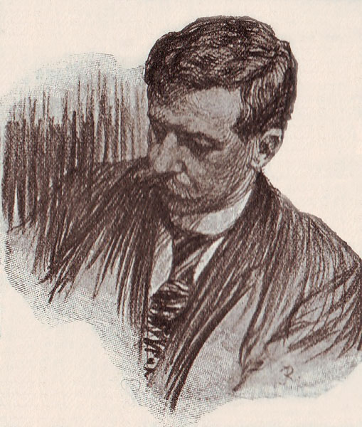 Janis Rozentāls Ādama Alkšņa portrets. (ap 1903. gadu)